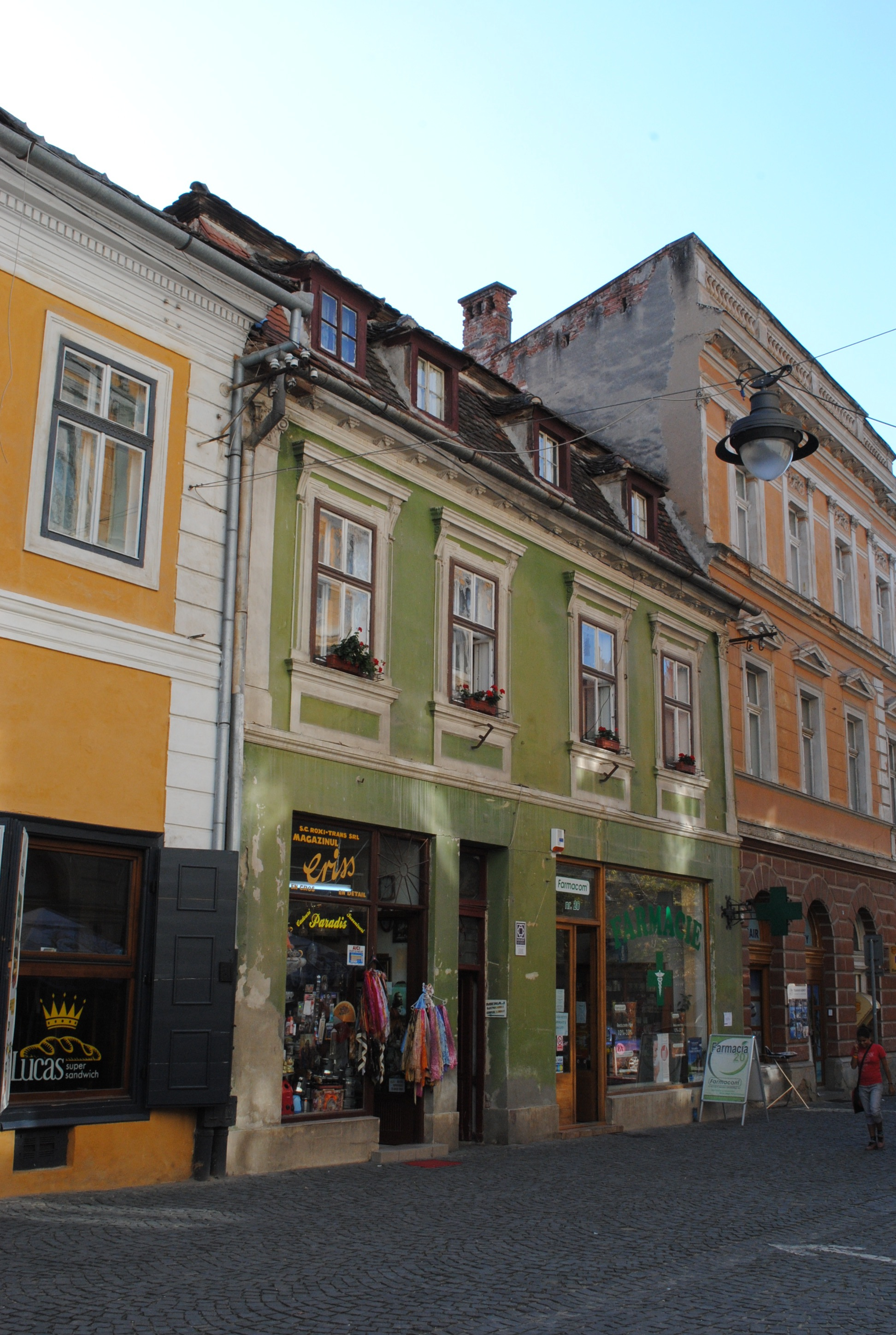 Casa Göllner, sec. XVI - XVII, mijl. sec. XIX